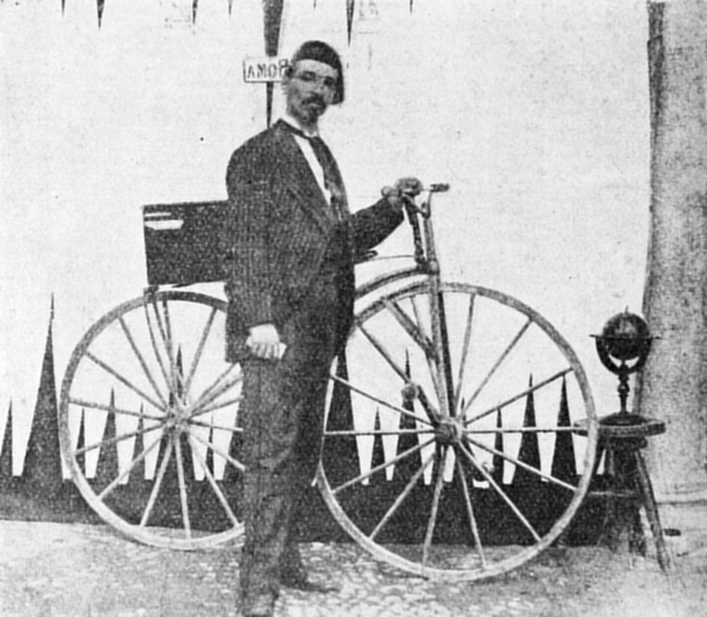 Il geografo prof. Enrico Frassi che fece il viaggio Milano-Vienna e ritorno su velocipede di legno